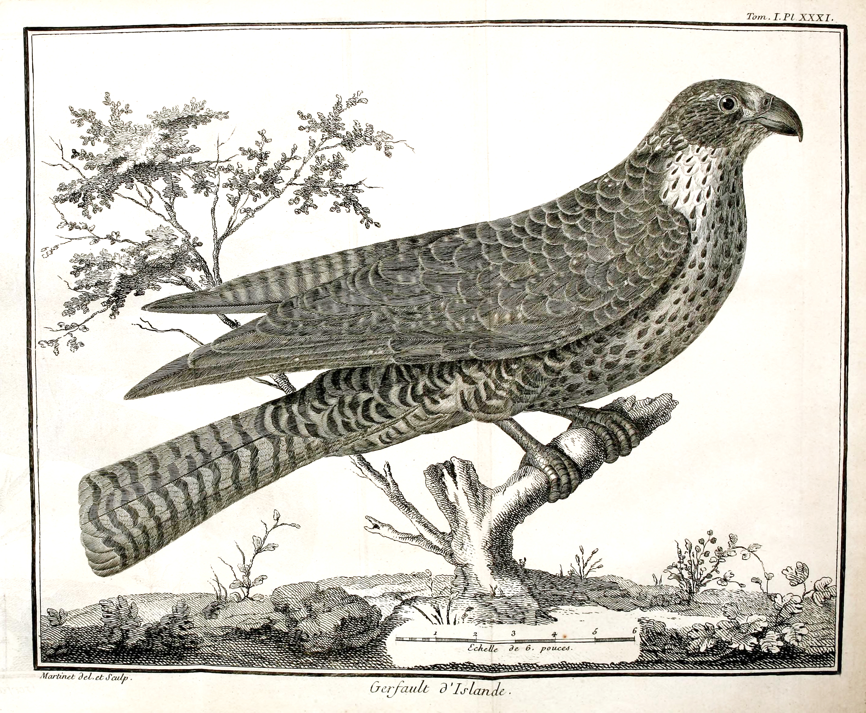 Gerfault d'Islande, = Falco rusticolus